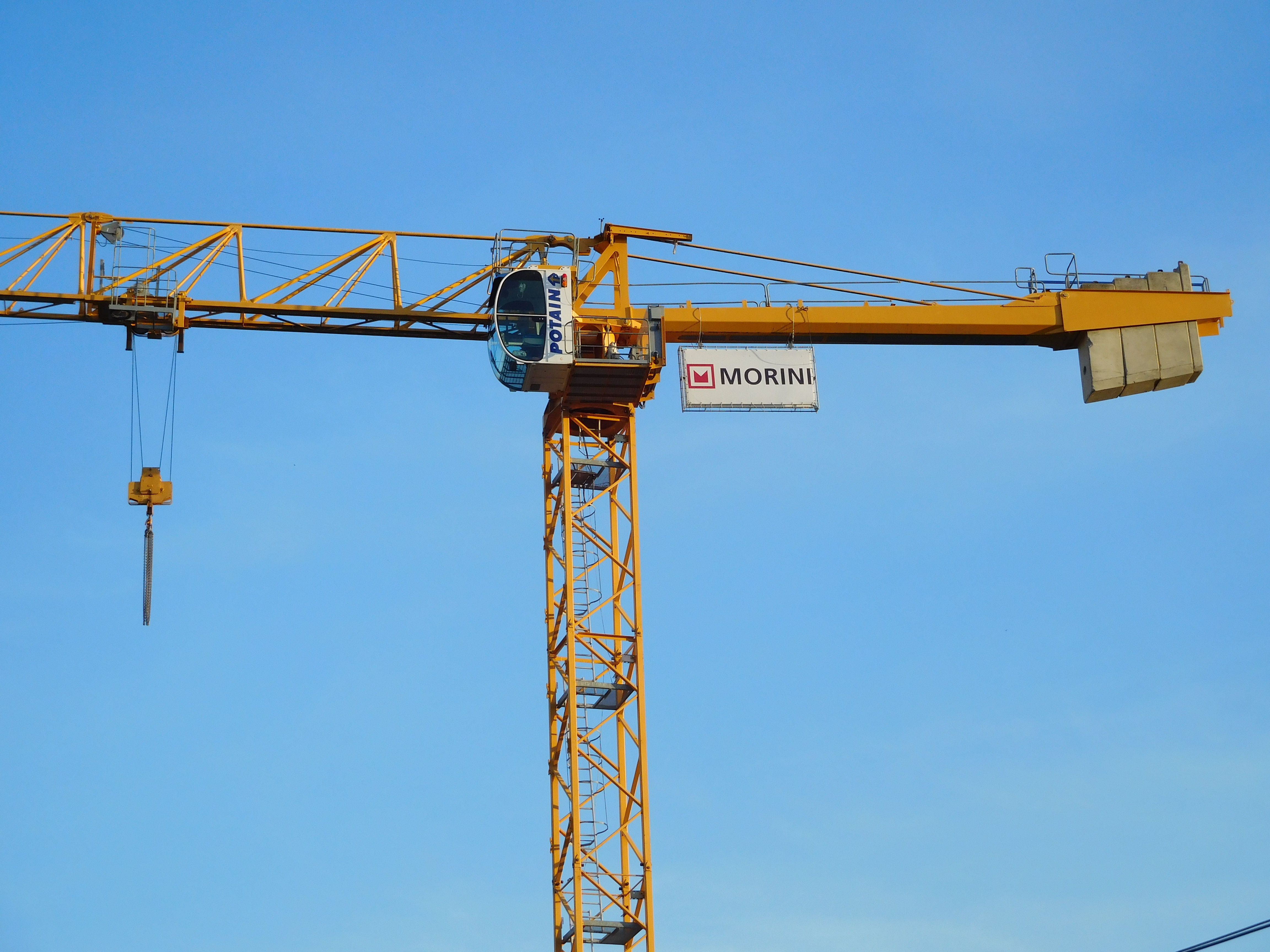 Grue à tour à montage par éléments Potain MDT 178 utilisée pour la construction d'un bâtiment, à Cosne-Cours-sur-Loire (Nièvre, France).